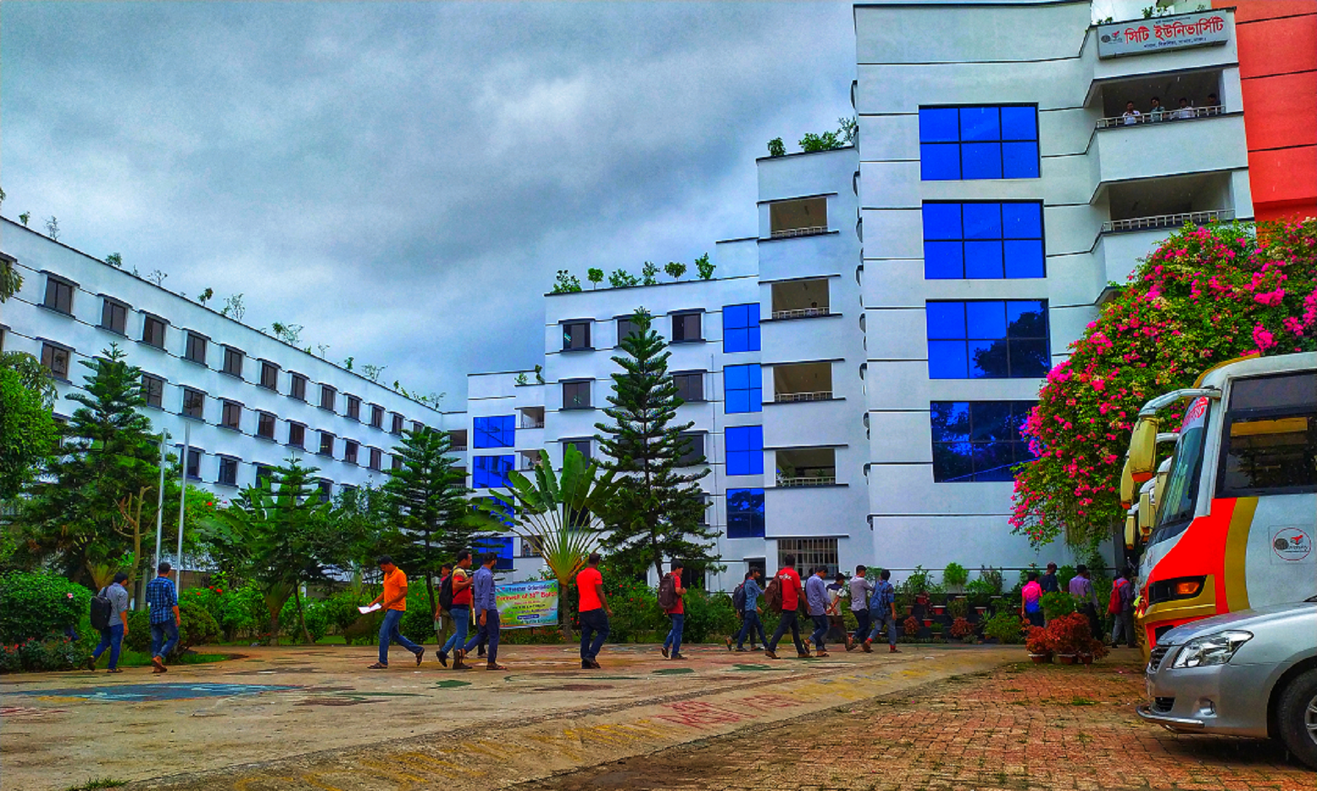 সিটি ইউনিভার্সিটি প্রশাসনিক ভবন